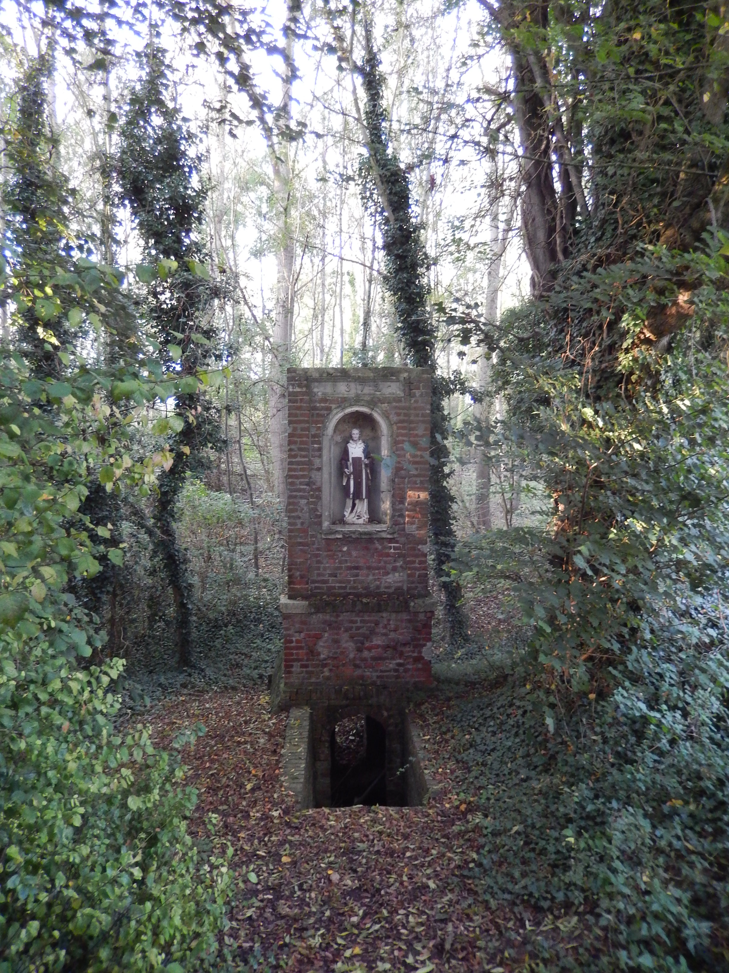 L'Ingon à Languevoisin-Quiquery